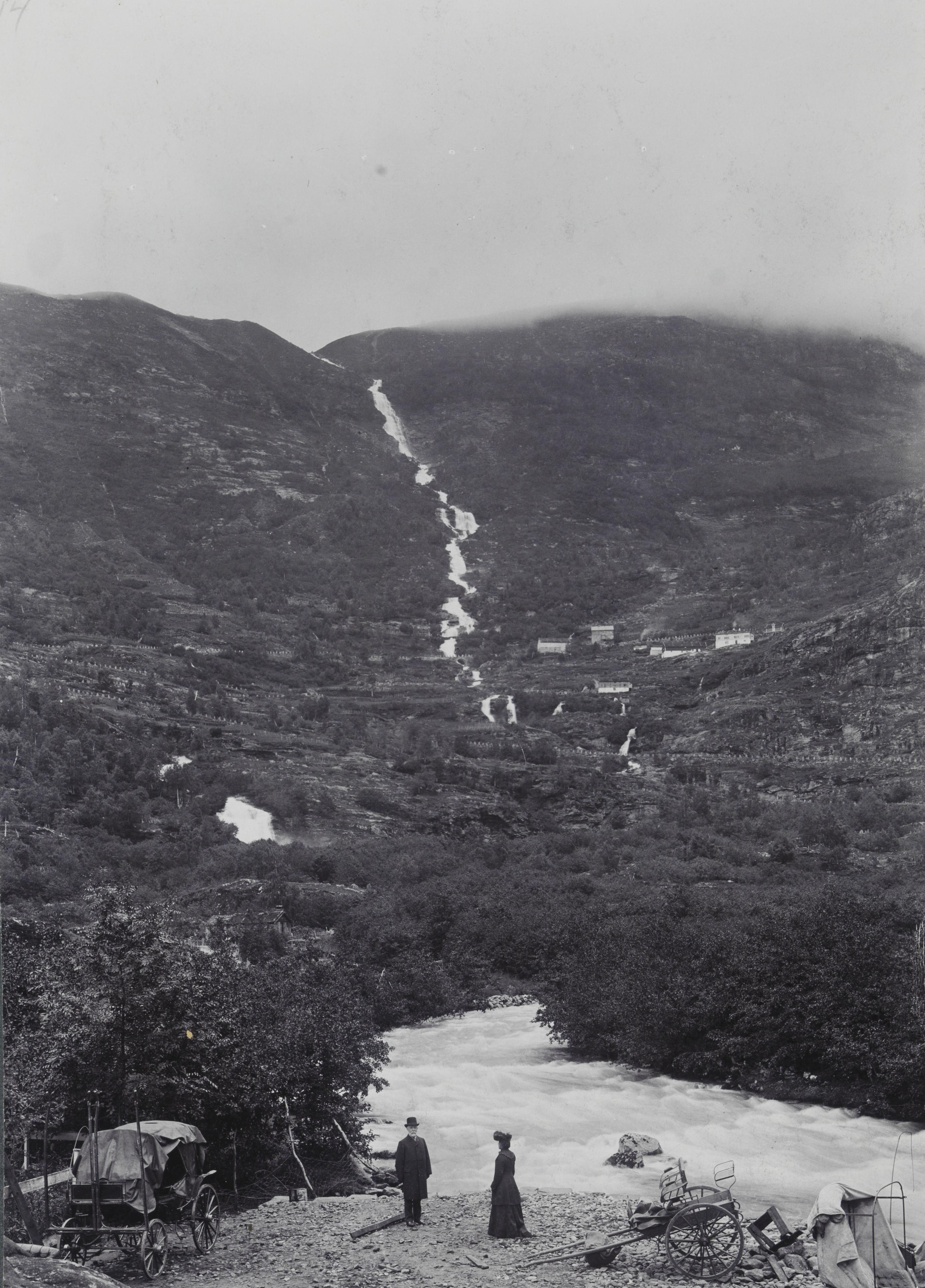 Bildet er hentet fra Nasjonalbibliotekets bildesamling Geiranger, Stranda, Møre og Romsdal